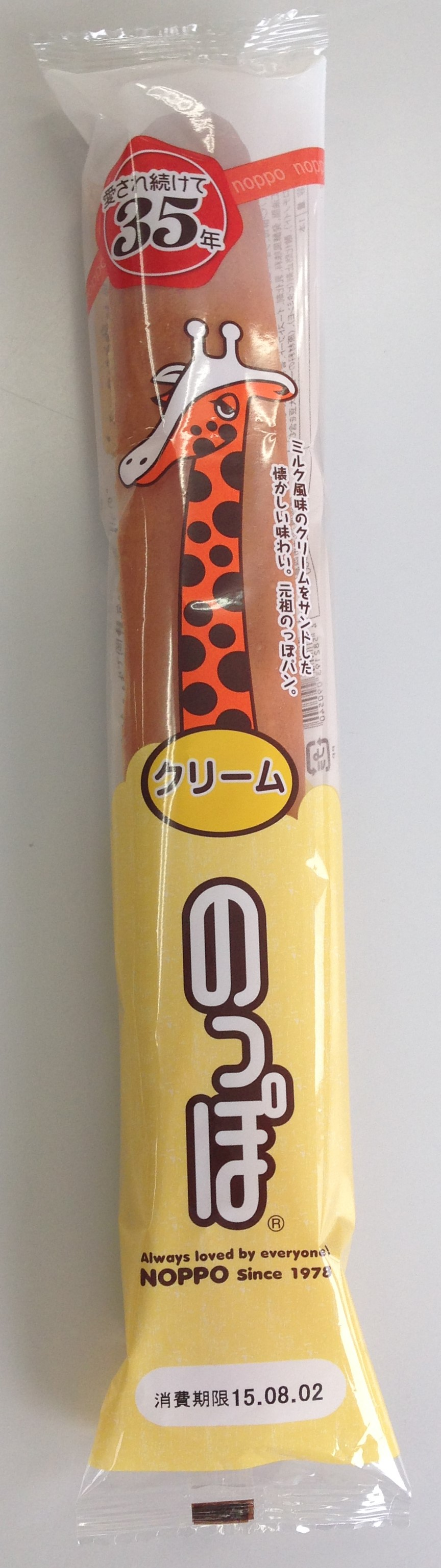 2008年～新パッケージ